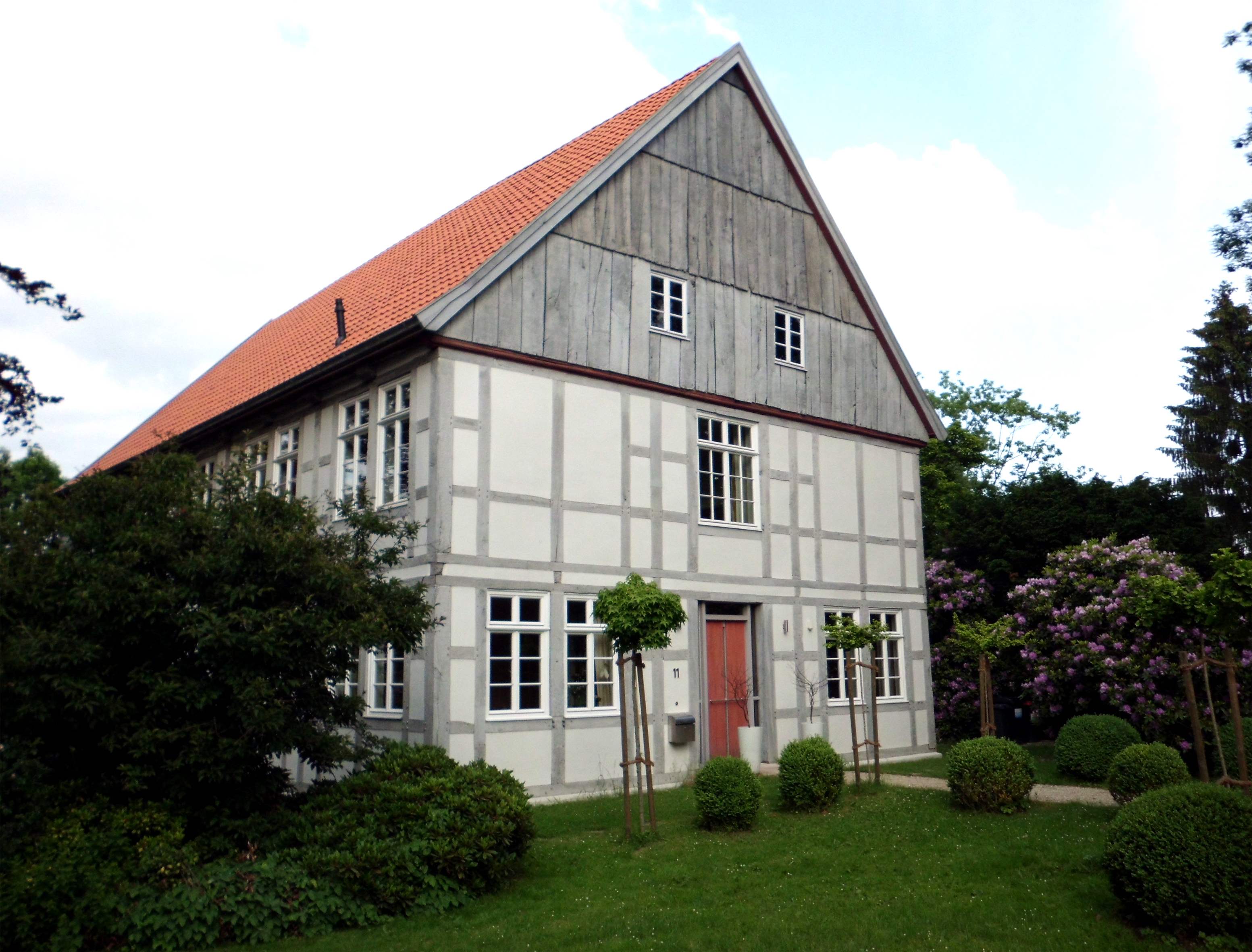 Bielefeld, Denkmalnummer 28, Schildesche, altes Pfarrhaus von 1771